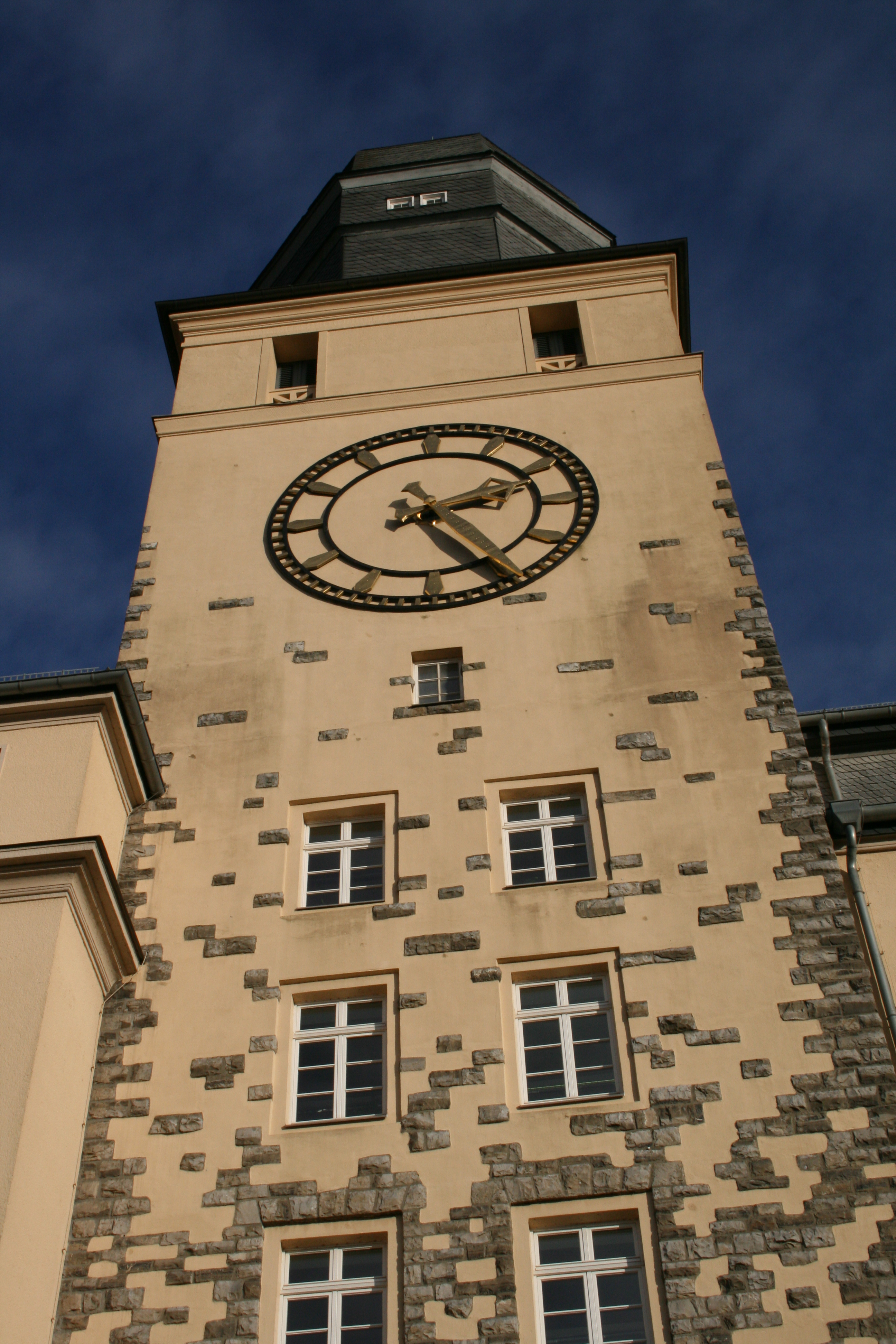 Turm der Bez-Regierung Arnsberg